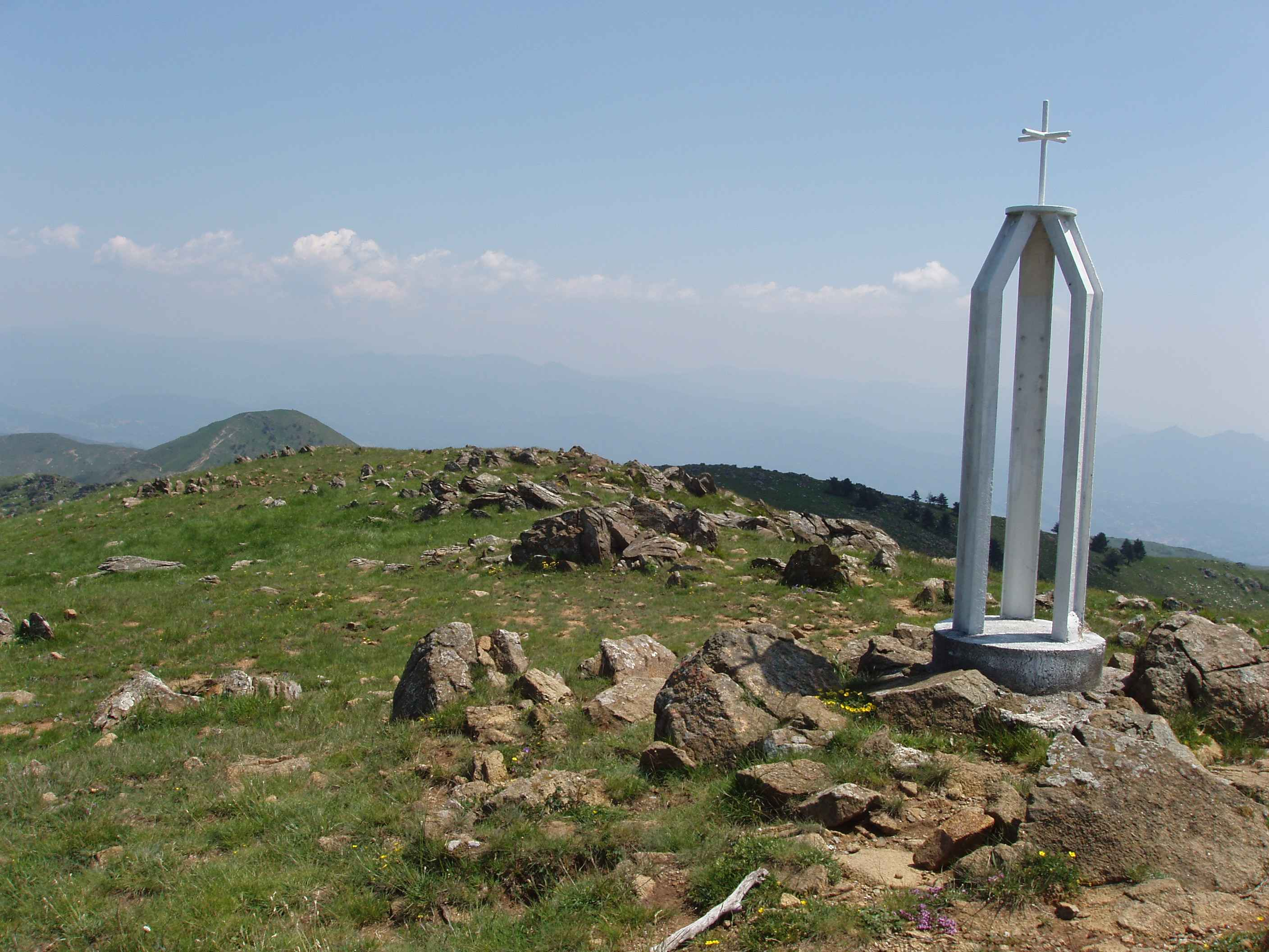 Monte delle Figne (Italy, Piemonte/Liguria)